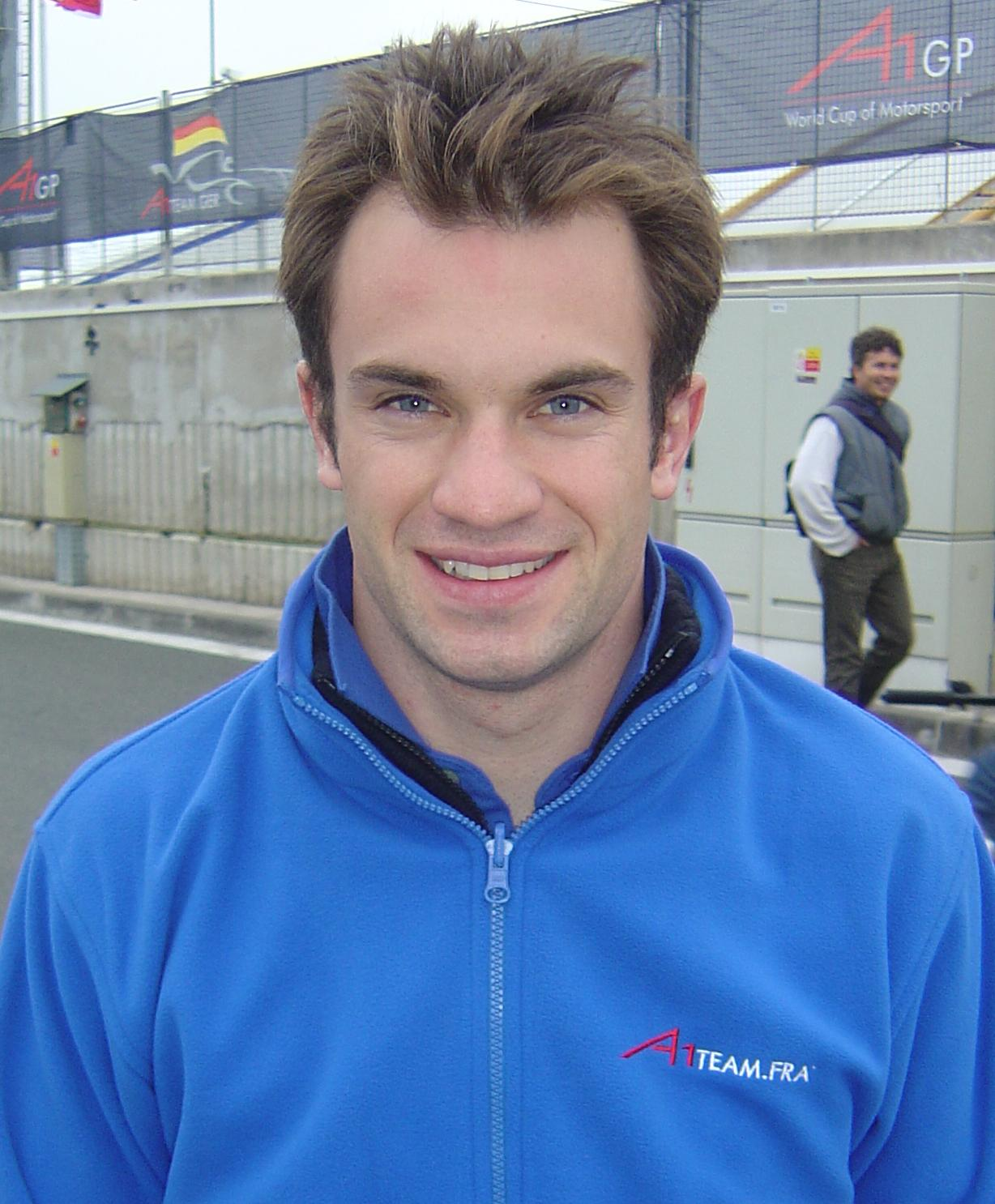 Nicolas Lapierre